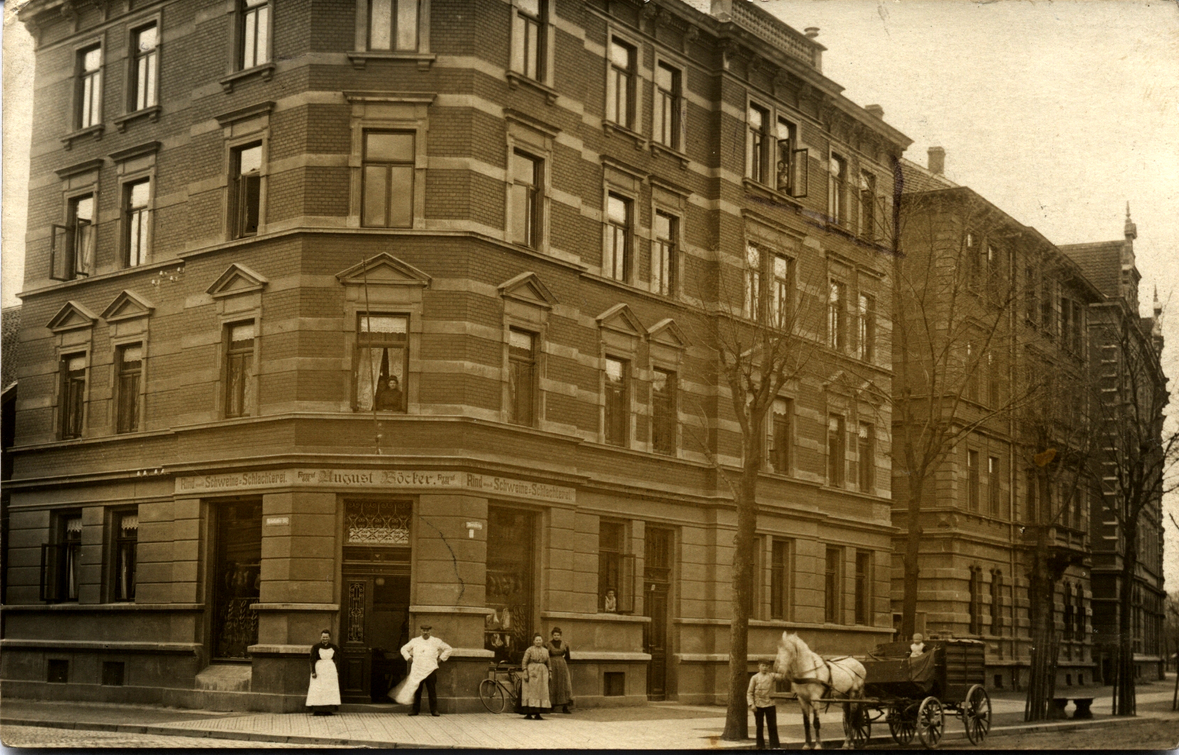 Eckhaus Altewiekring 70 in Braunschweig um 1900 mit dem Eigentümer Schlachtermeister August Böcker vor seinem Laden mit Angehörigen, Bediensteten und Pferdewagen.